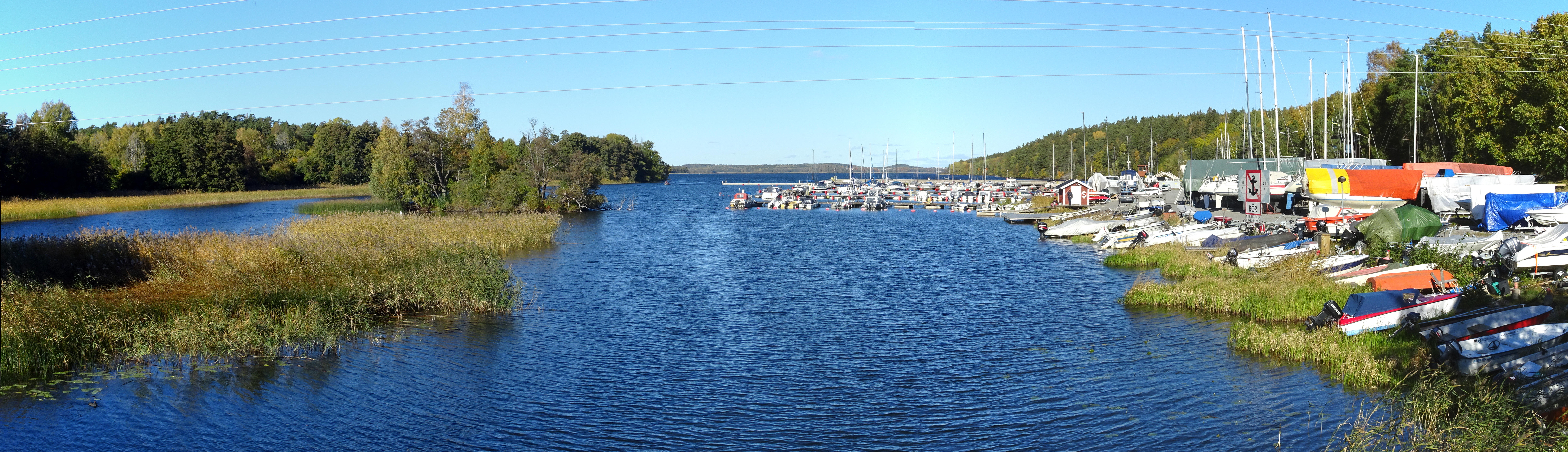 Skäftingesundet mot norr